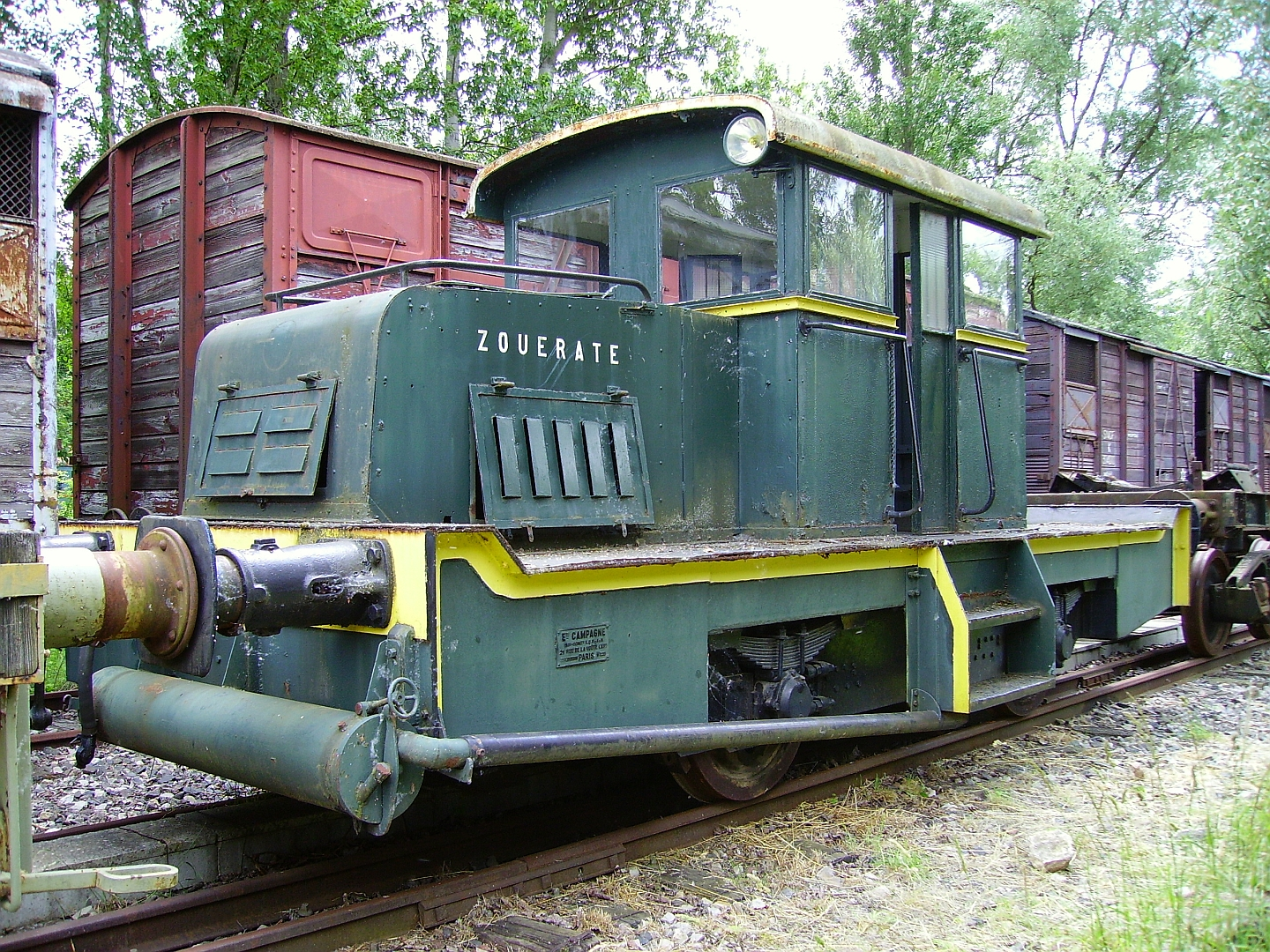 Un locotracteur Campagne à voie normale au 5ème Régiment du Génie de Versailles, le 14/06/2009.